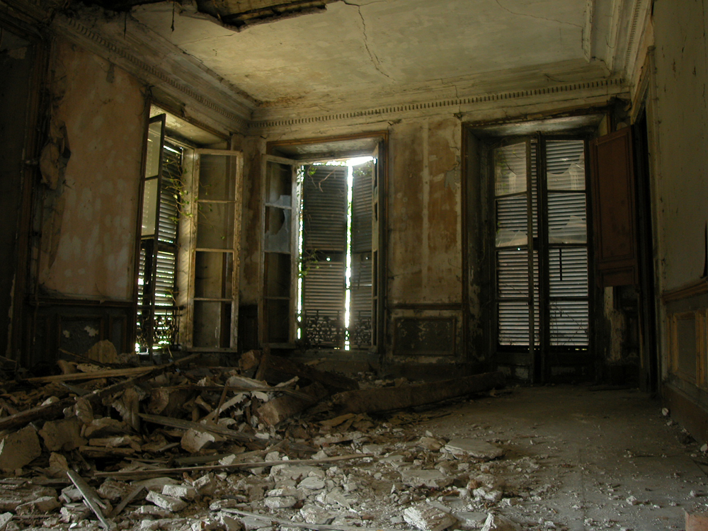 Exploration urbaine (urbex) du château de Montjean à Wissous, France.